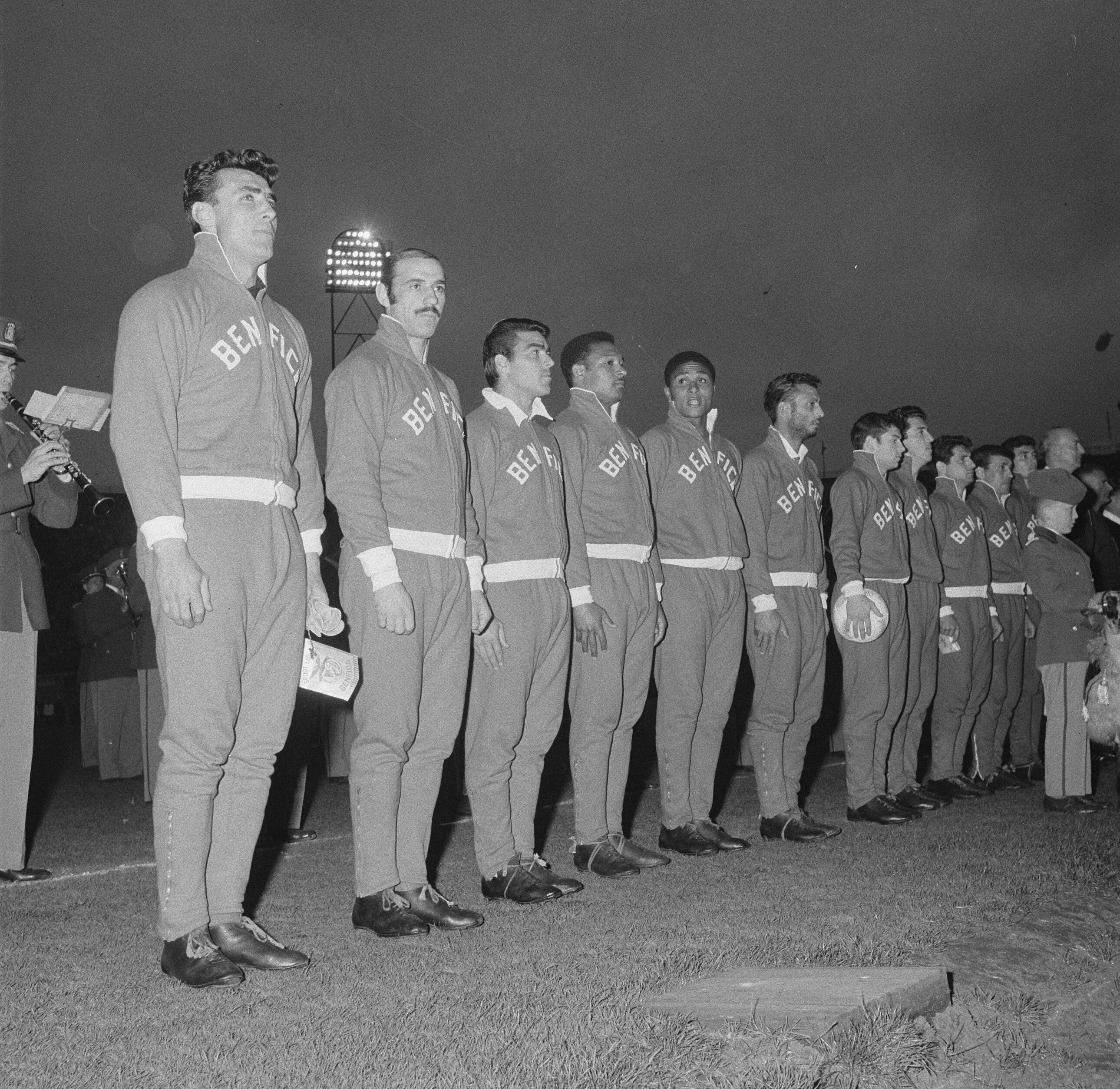 Collectie / Archief : Fotocollectie Anefo Reportage / Serie : [ onbekend ] Beschrijving : Beufica tegen Real Madrid 5-3 elftal van Beufica Datum : 2 mei 1962 Trefwoorden : elftallen, sport, voetbal Instellingsnaam : Real Madrid Fotograaf : Nijs, Jac. de / Anefo Auteursrechthebbende : Nationaal Archief Materiaalsoort : Negatief (zwart/wit) Nummer archiefinventaris : bekijk toegang 2.24.01.03 Bestanddeelnummer : 913-8532